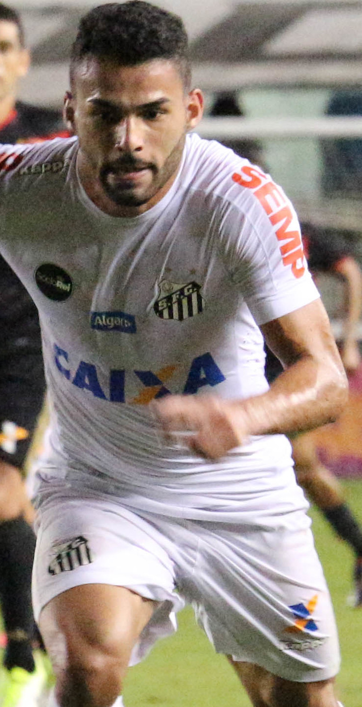 Foto: Douglas Teixeira/Futebol Santista